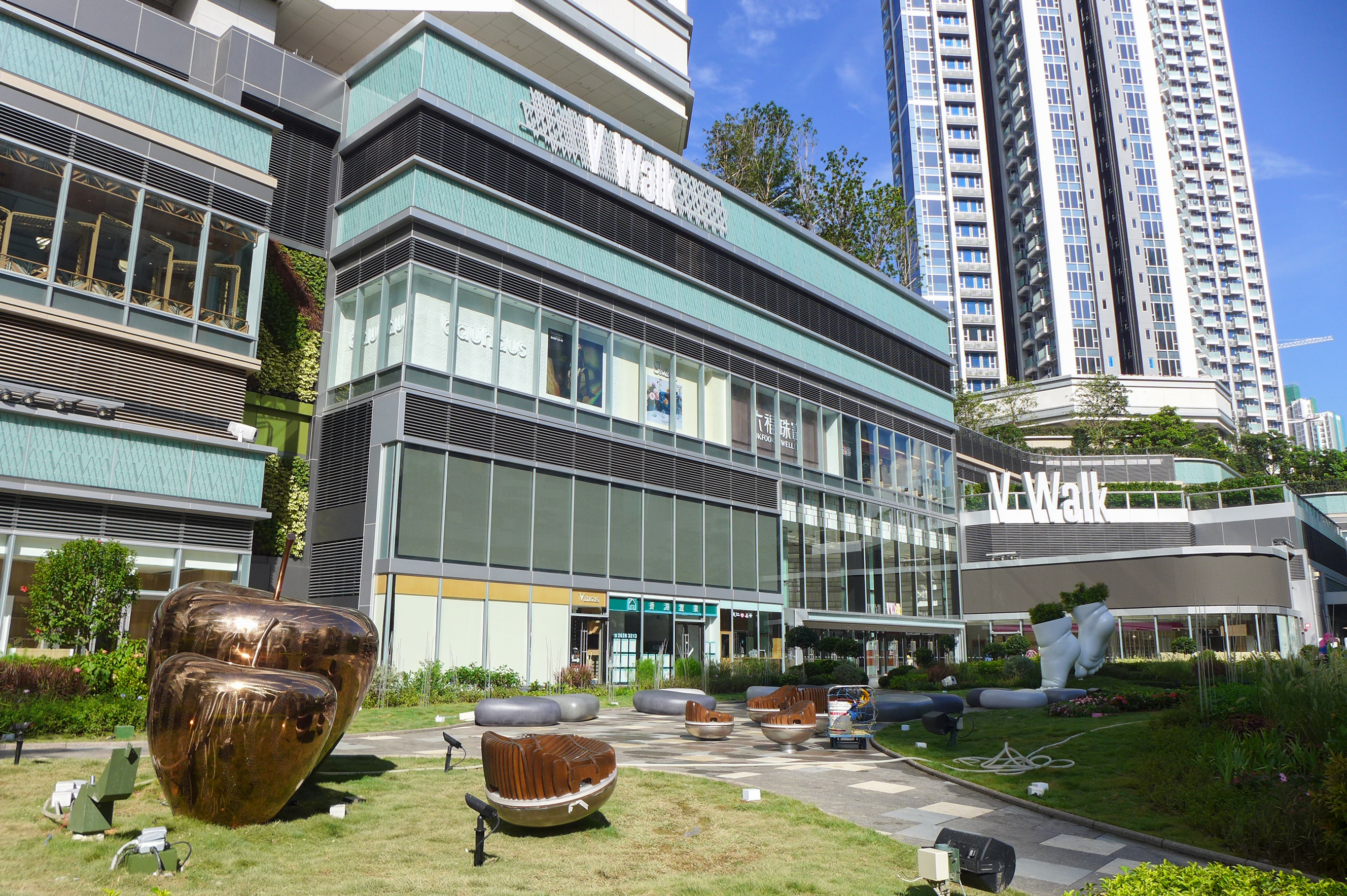 V walk Outside view